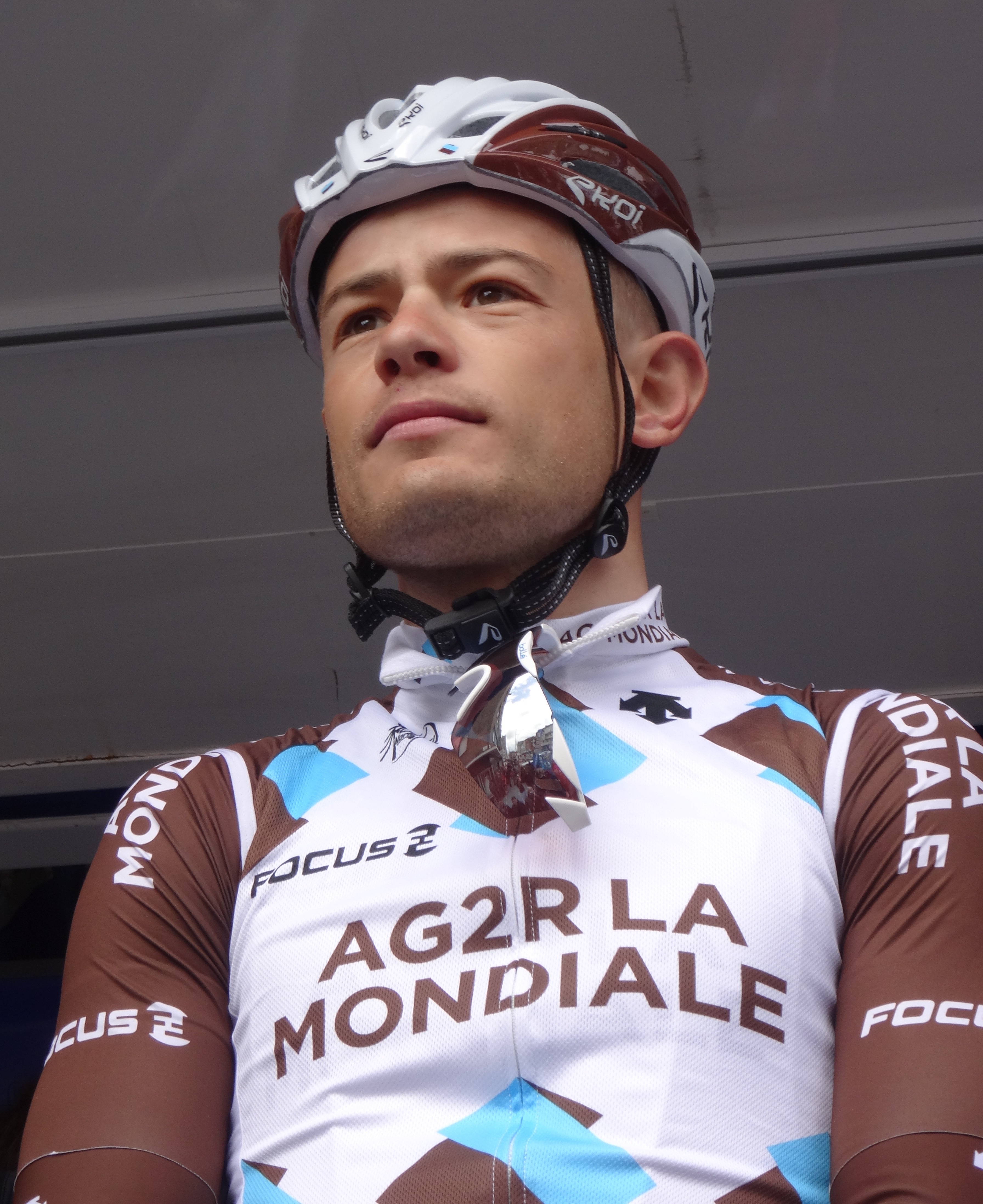 Reportage photographique réalisé le mercredi 7 mai 2014 au départ de la première étape de l'édition 2014 des Quatre jours de Dunkerque à Dunkerque, Nord, Nord-Pas-de-Calais, France. Depicted person: Steve Chainel Depicted team: AG2R La Mondiale